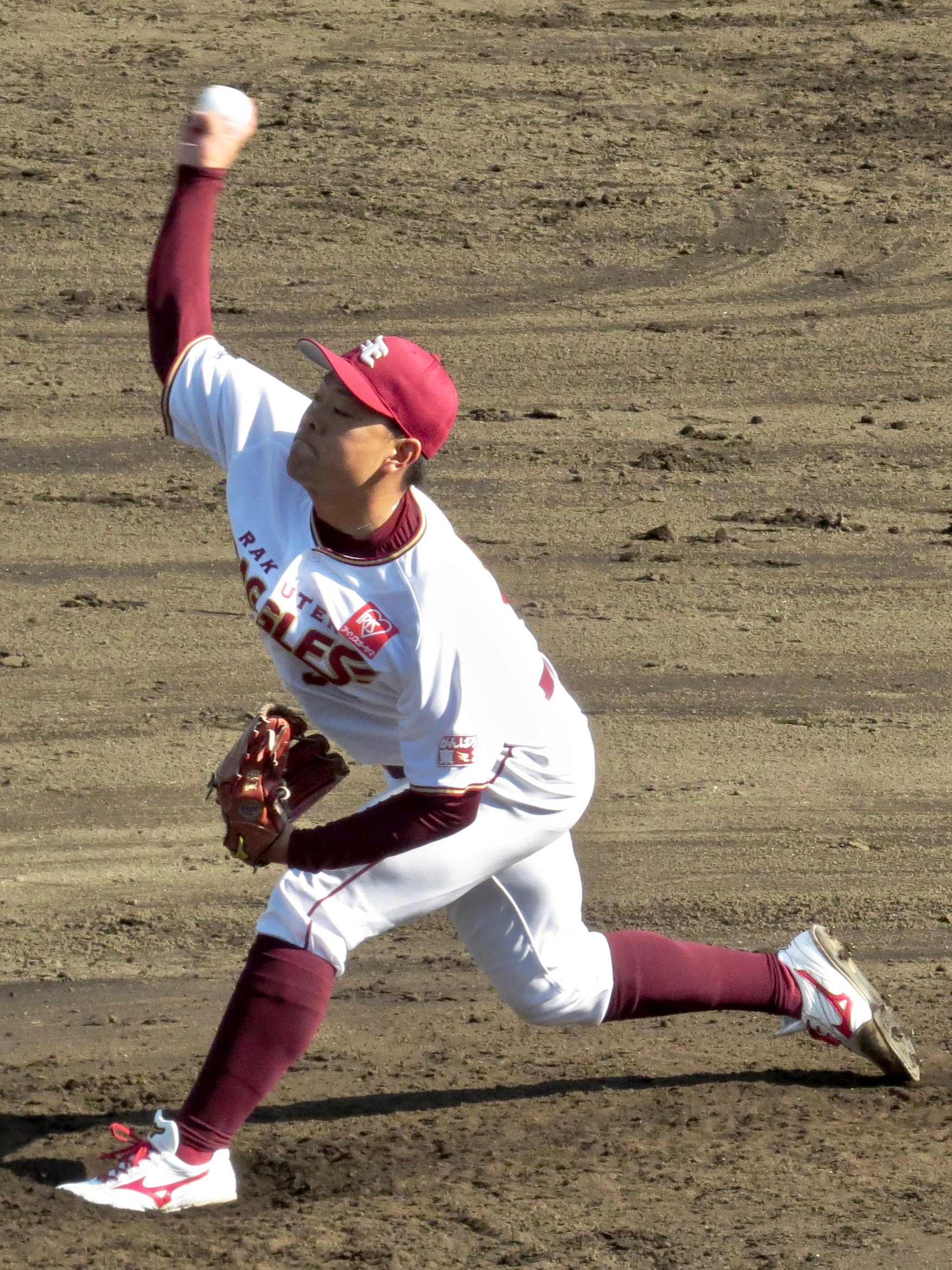 さいたま市営浦和球場にて